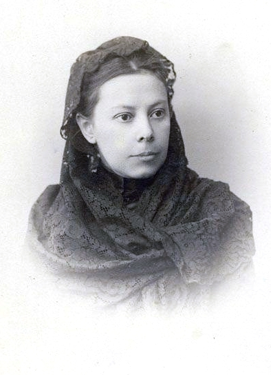 Н. В. Михайловская, урожденная Чарыкова